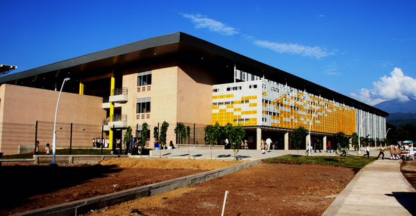 Institución educativa ubicada en el municipio de Agustín Codazzi.